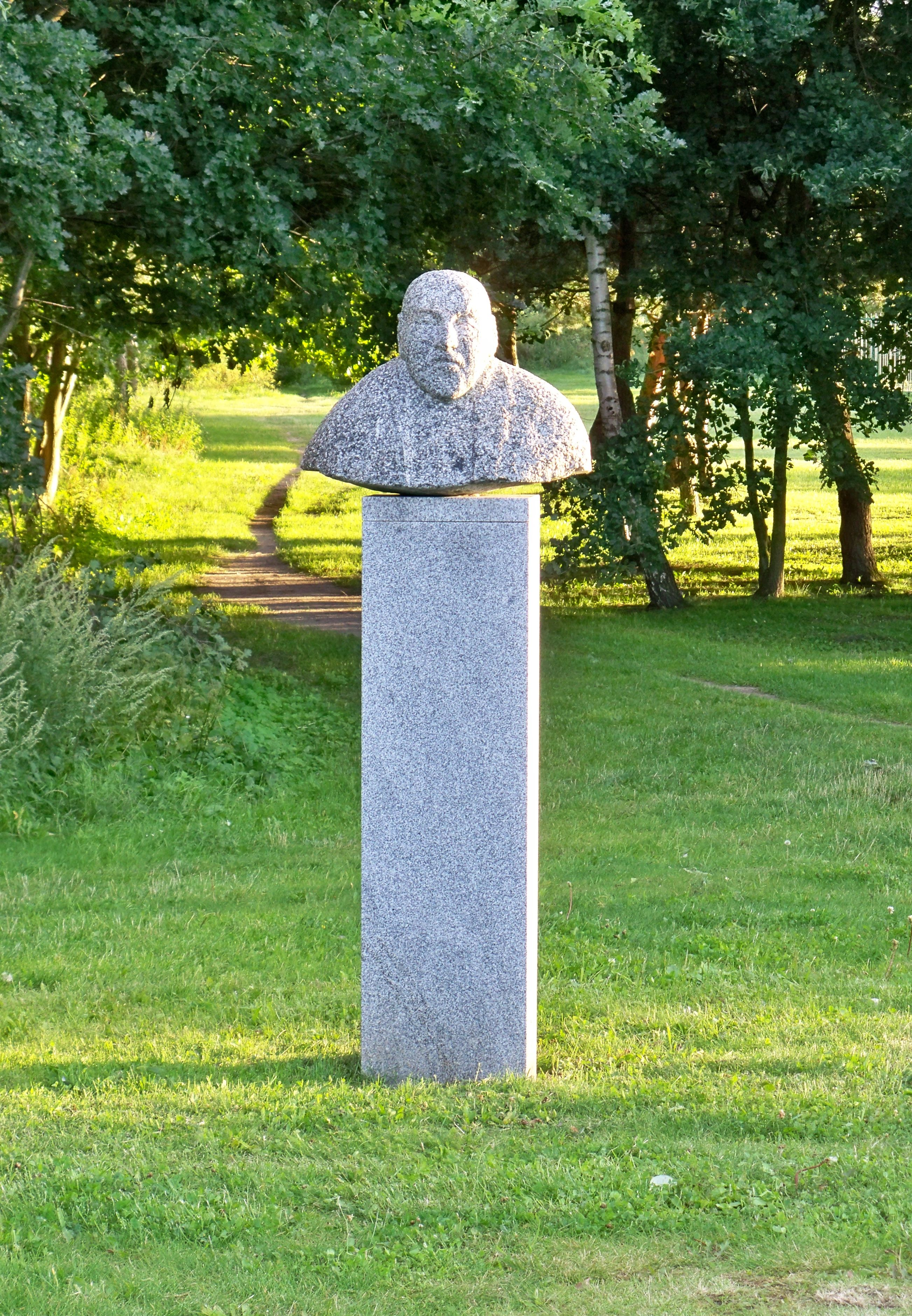 Park rzeźb "Wielcy Gdańszczanie" powstałych podczas XXVII Pleneru Rzeźby z Granitu Kaszubskiego (1-30 września 2008) w skansenie we Wdzydzach Kiszewskich. Prezentowany w Parku Reagana w Gdańsku. Günter Grass (rzeźb. Anna Bem-Borucka)